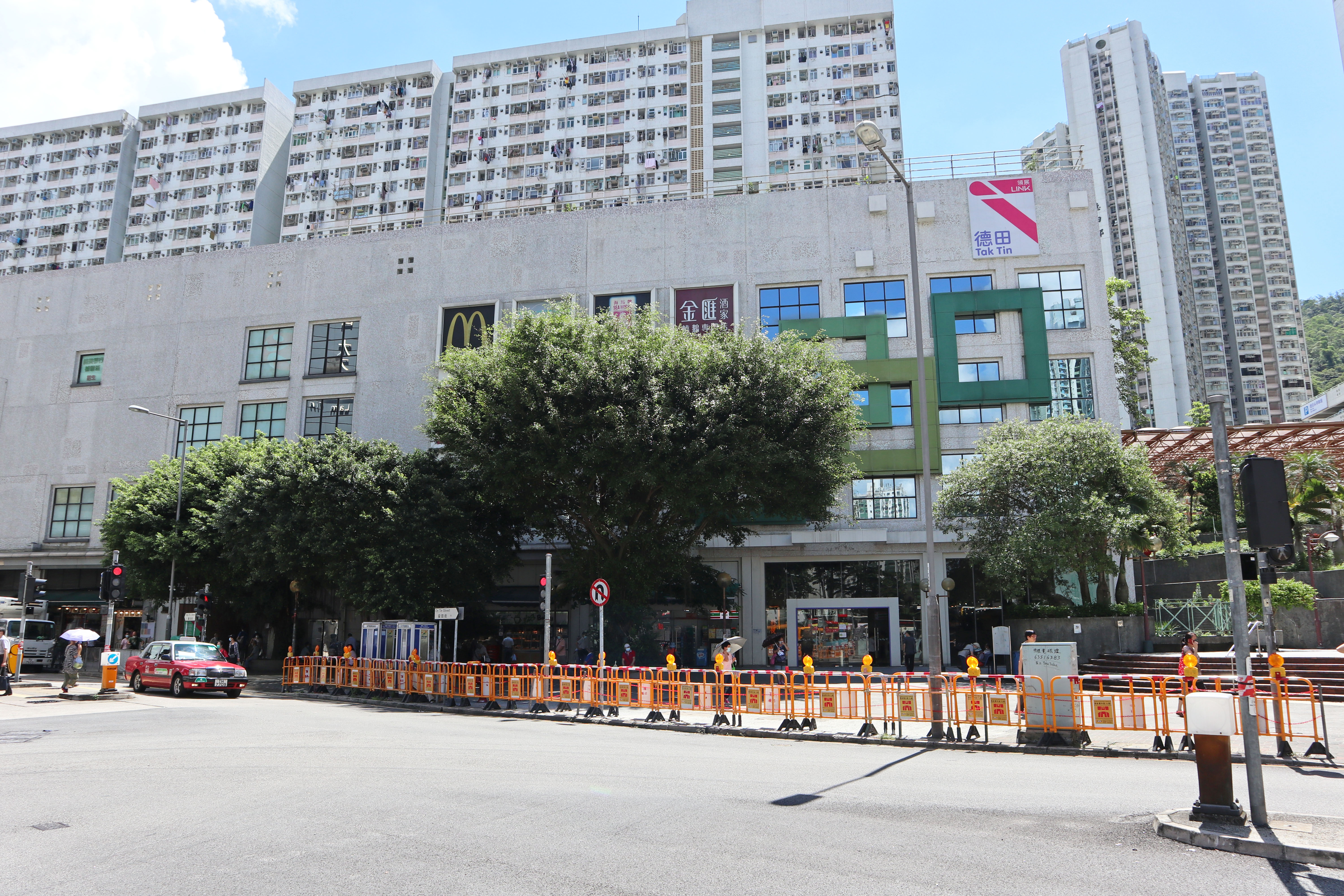 藍田德田邨德田商場外觀